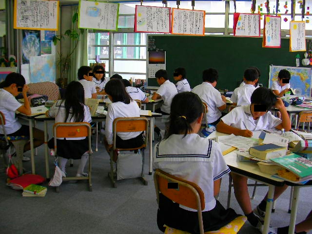 暁秀初等学校レギュラークラス教室における机配置のアレンジの例（１）